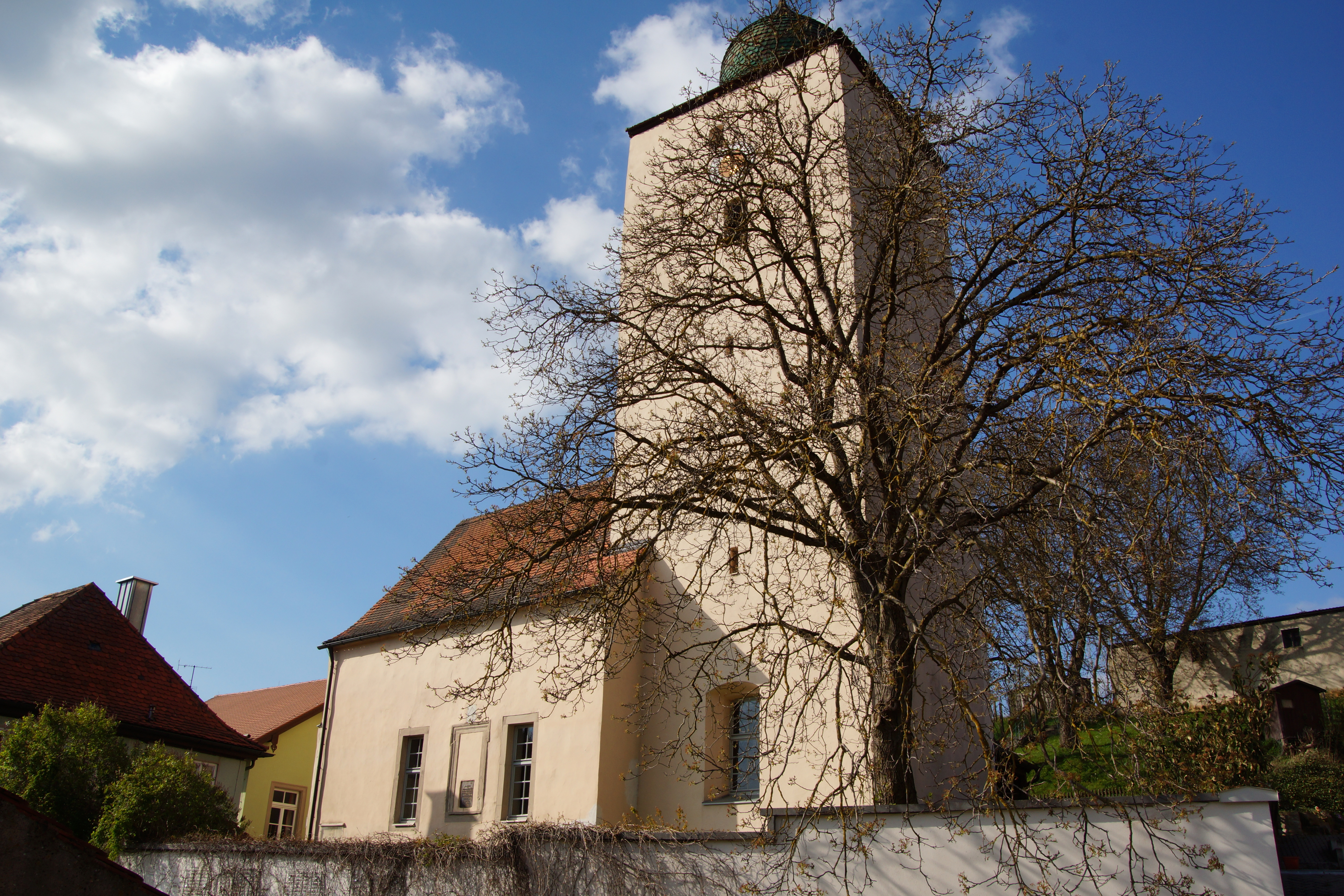 Die evangelische Pfarrkirche St. Ulrich in Thalmannsfeld